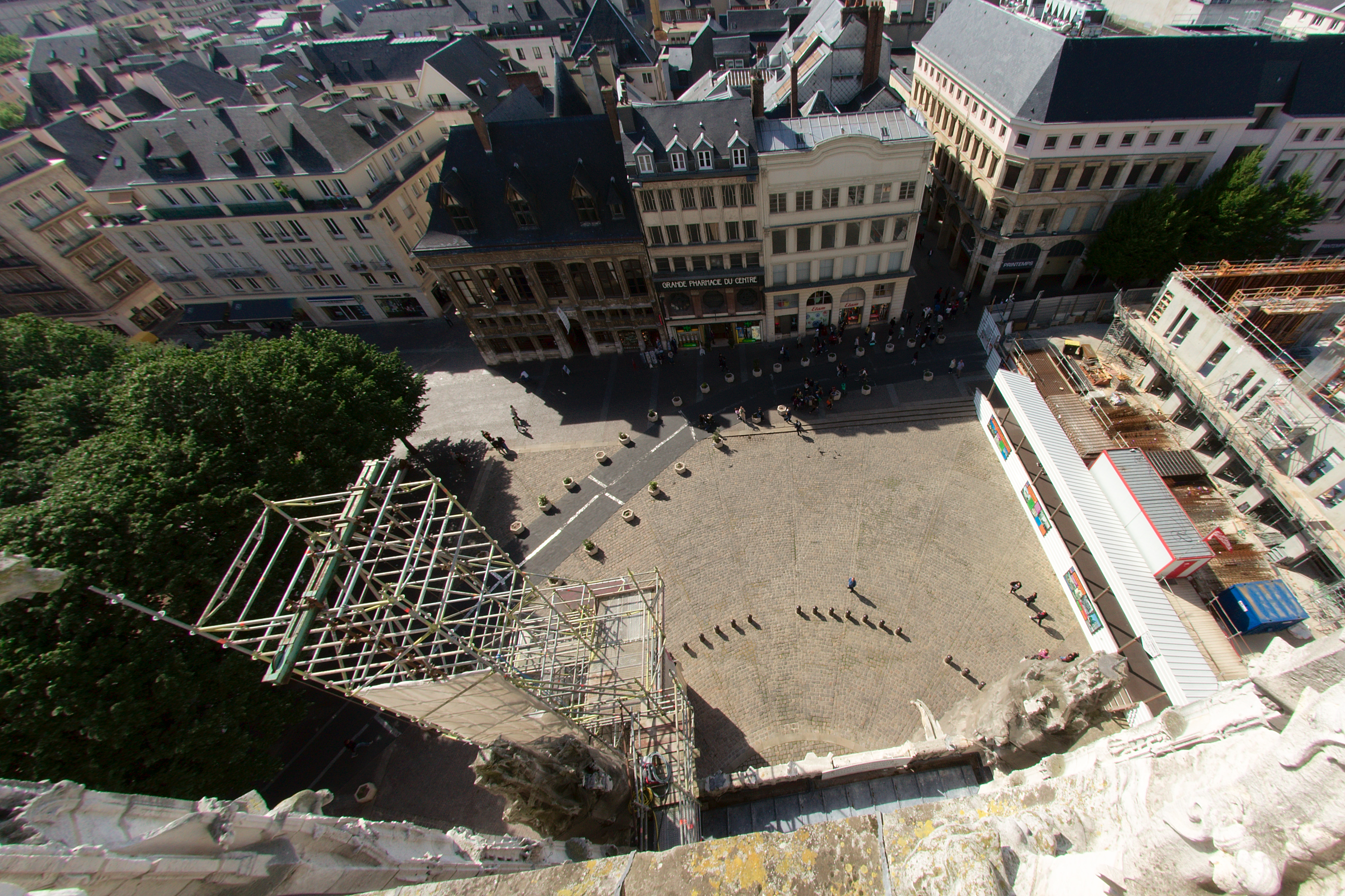 Place de la Cathédrale vue depuis la salle des Rois de la cathédrale Notre-Dame de Rouen